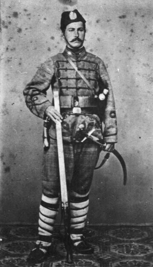 Иван Кършовски (1839-1916)